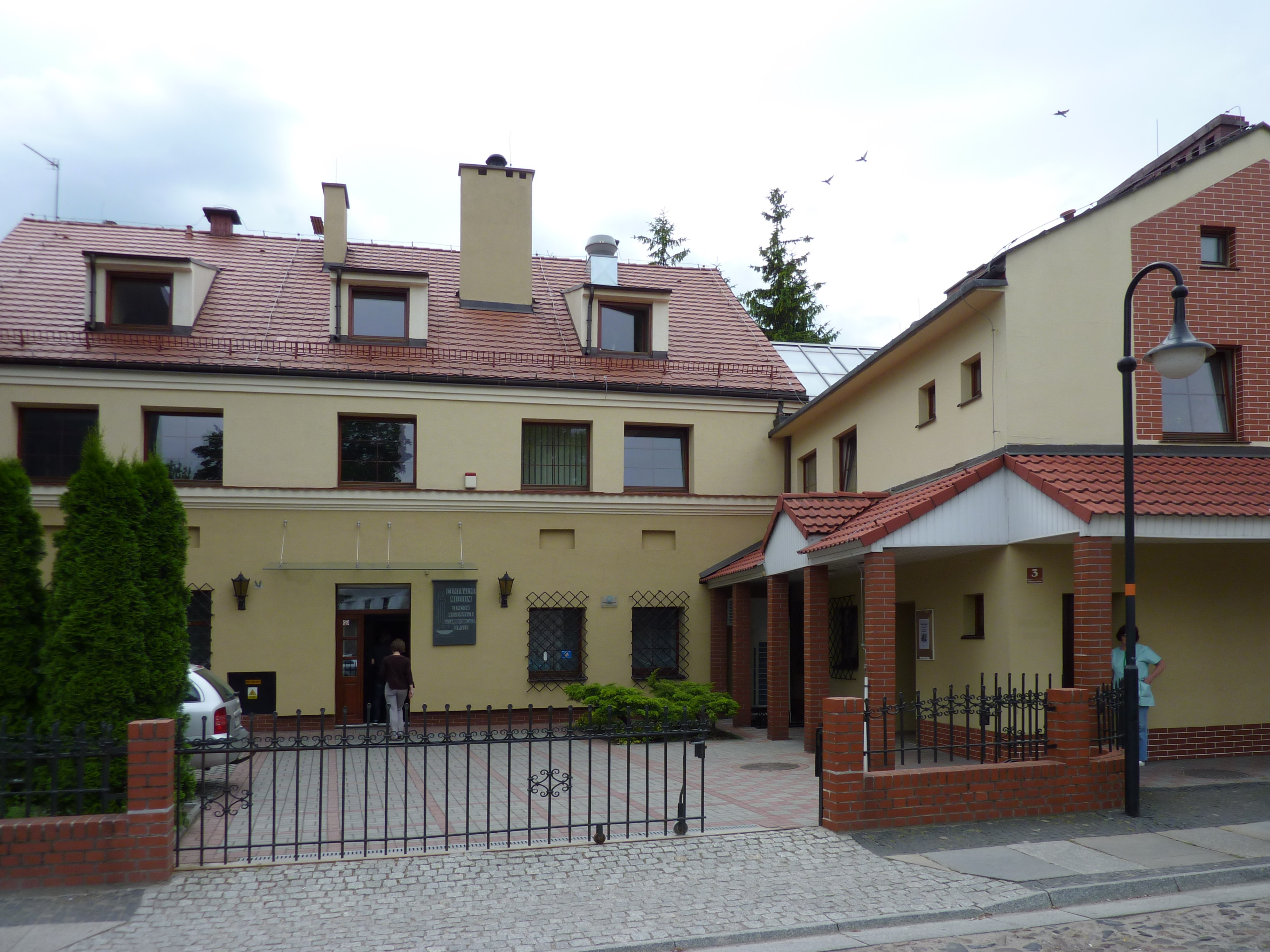 Siedziba Centralnego Muzeum Jeńców Wojennych w Opolu